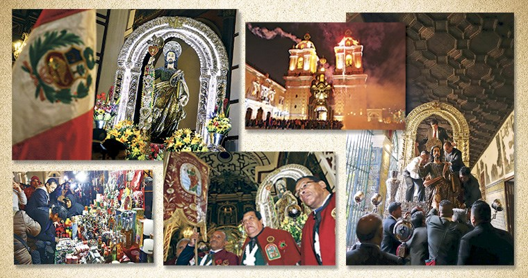 Fotos de la ceremonia de lectura de la Resolución Viceministerial que declara la festividad como Patrimonio Cultural de la Nación.